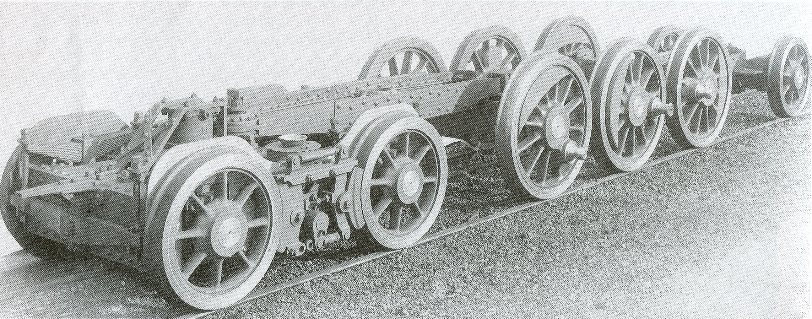 Werkfoto von Krauss-Maffei über die Achsgruppe der E 36 mit vorderem Krauss-Lotter-Gestell